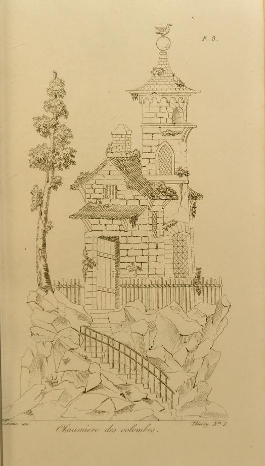 安東南‧卡漢姆的「裝置」藝術蛋糕設計圖樣